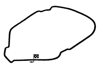 Streckenverlauf.